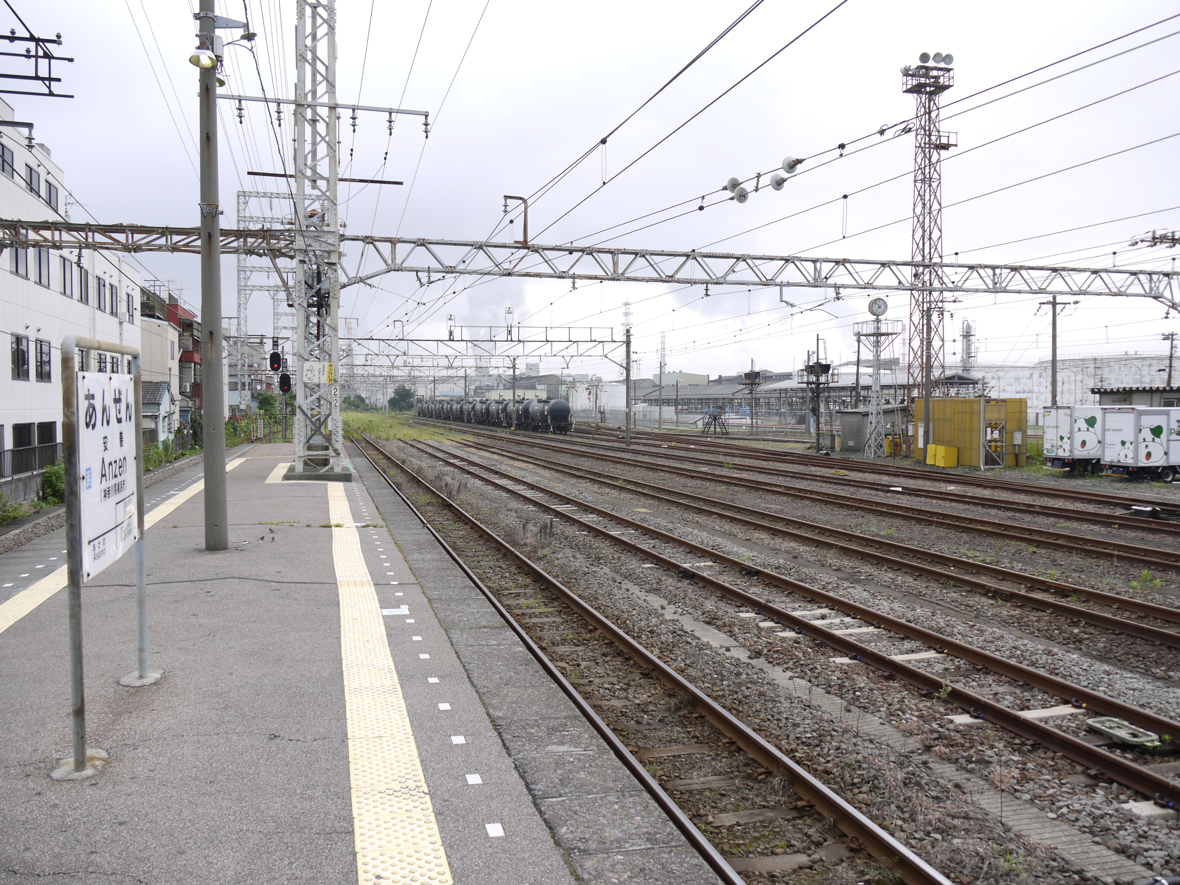 安善駅 貨物専用線